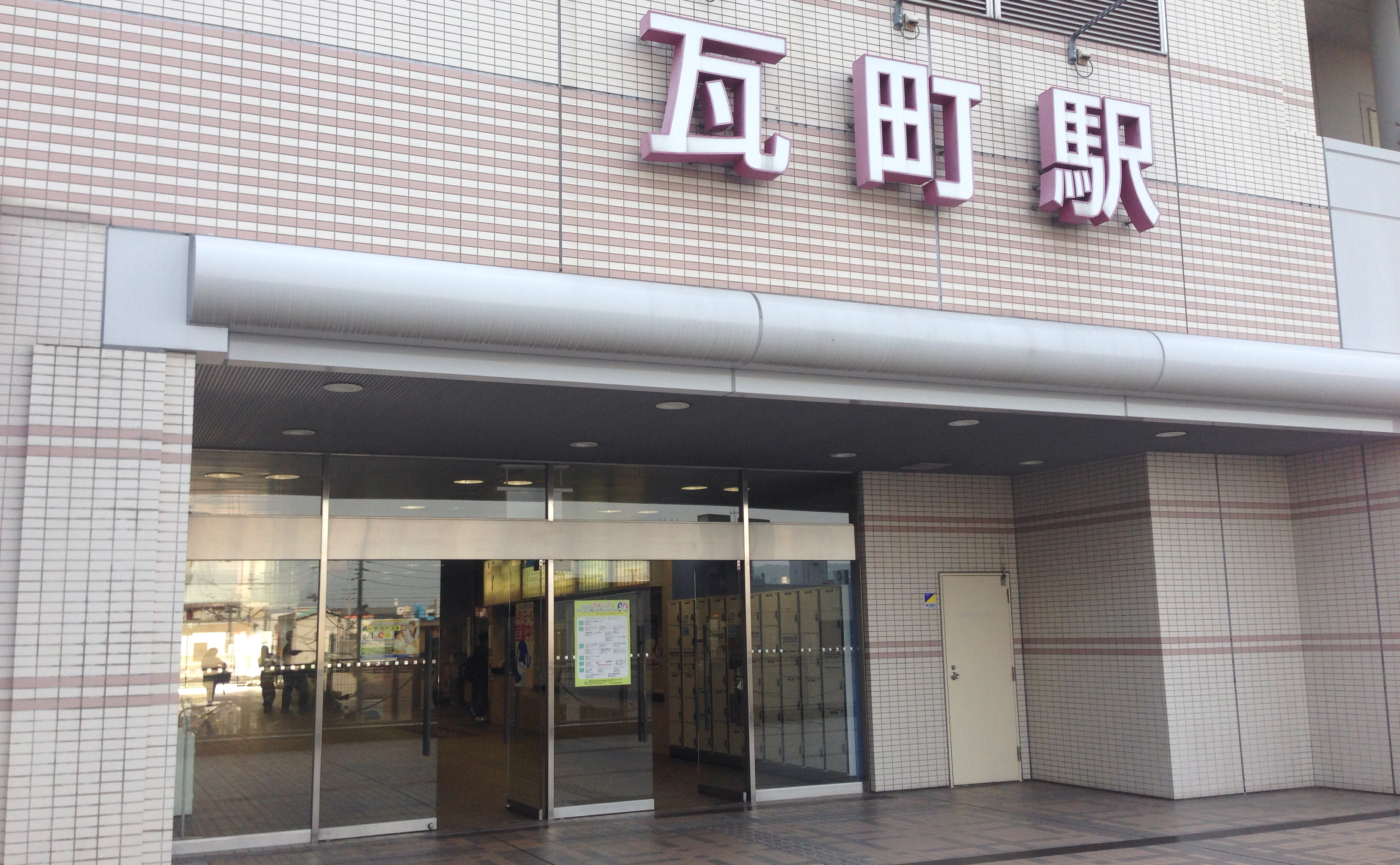 瓦町駅ビル（ことでん瓦町駅）塩上町入口（２階） 吴语: Kawaramachi Station Building (Kotoden Kawaramachi station) Shiogamicho entrance (2nd floor)